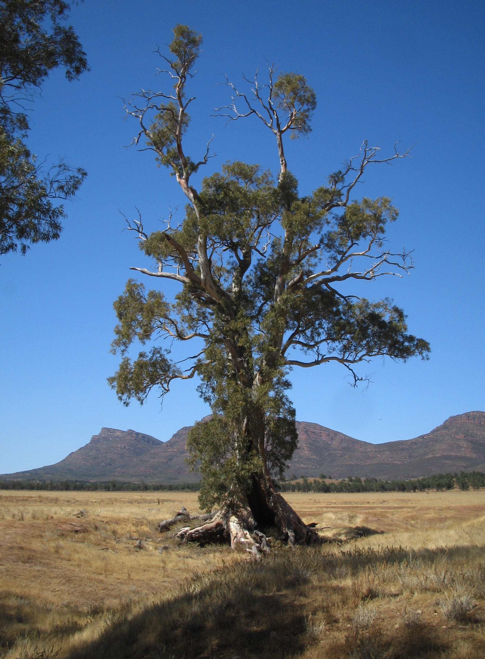 Cazneaux Tree